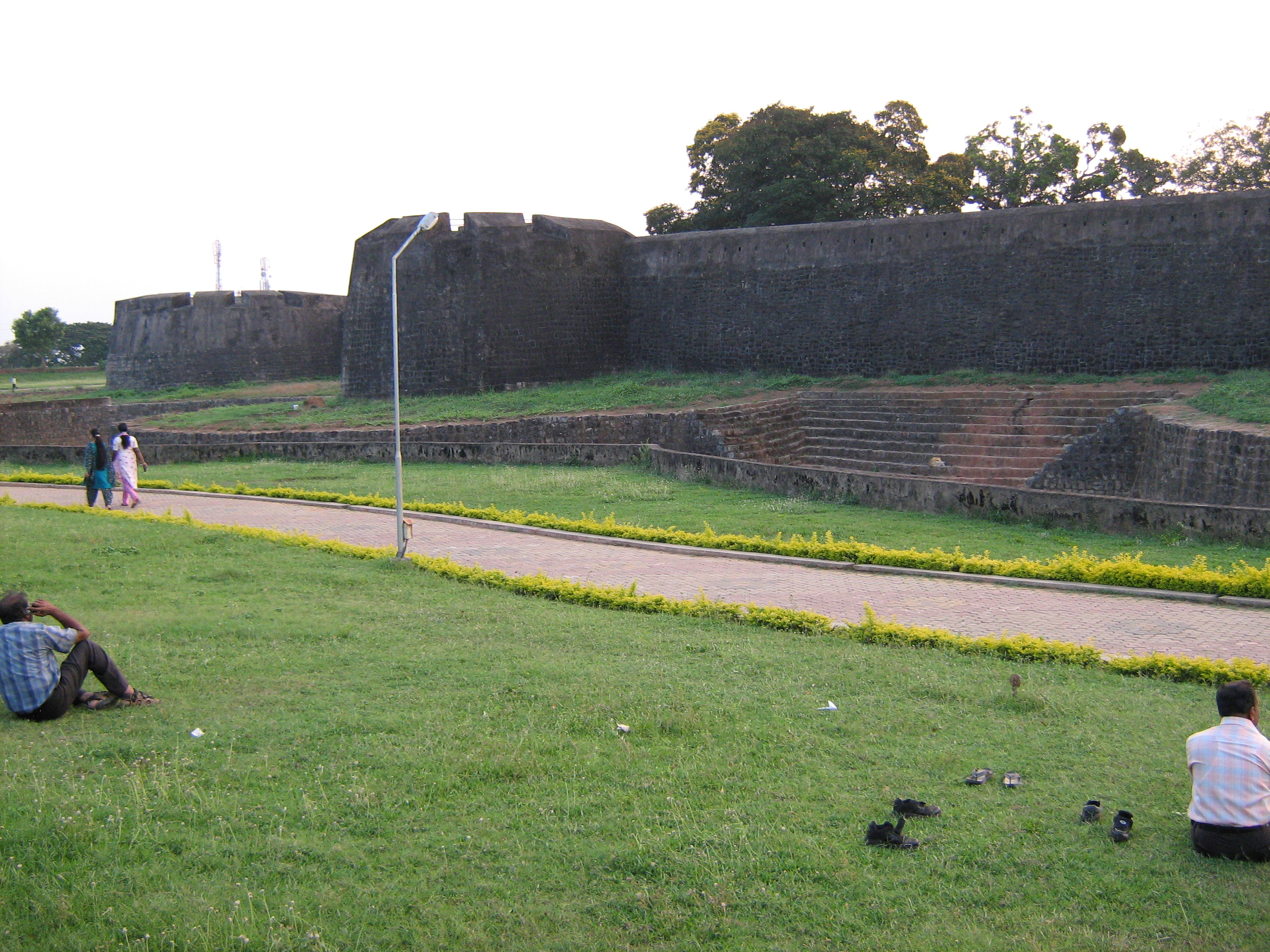 പാലക്കാട്ടെ, പ്രസിദ്ധമായ ടിപ്പുവിന്‍റെ കോട്ട. ഒരു വശത്തു നിന്നുമുള്ള ദൃശ്യം. കോട്ടയ്ക്കു ചുറ്റുമുള്ള കിടങ്ങും ചിത്രത്തില്‍ കാണാം.